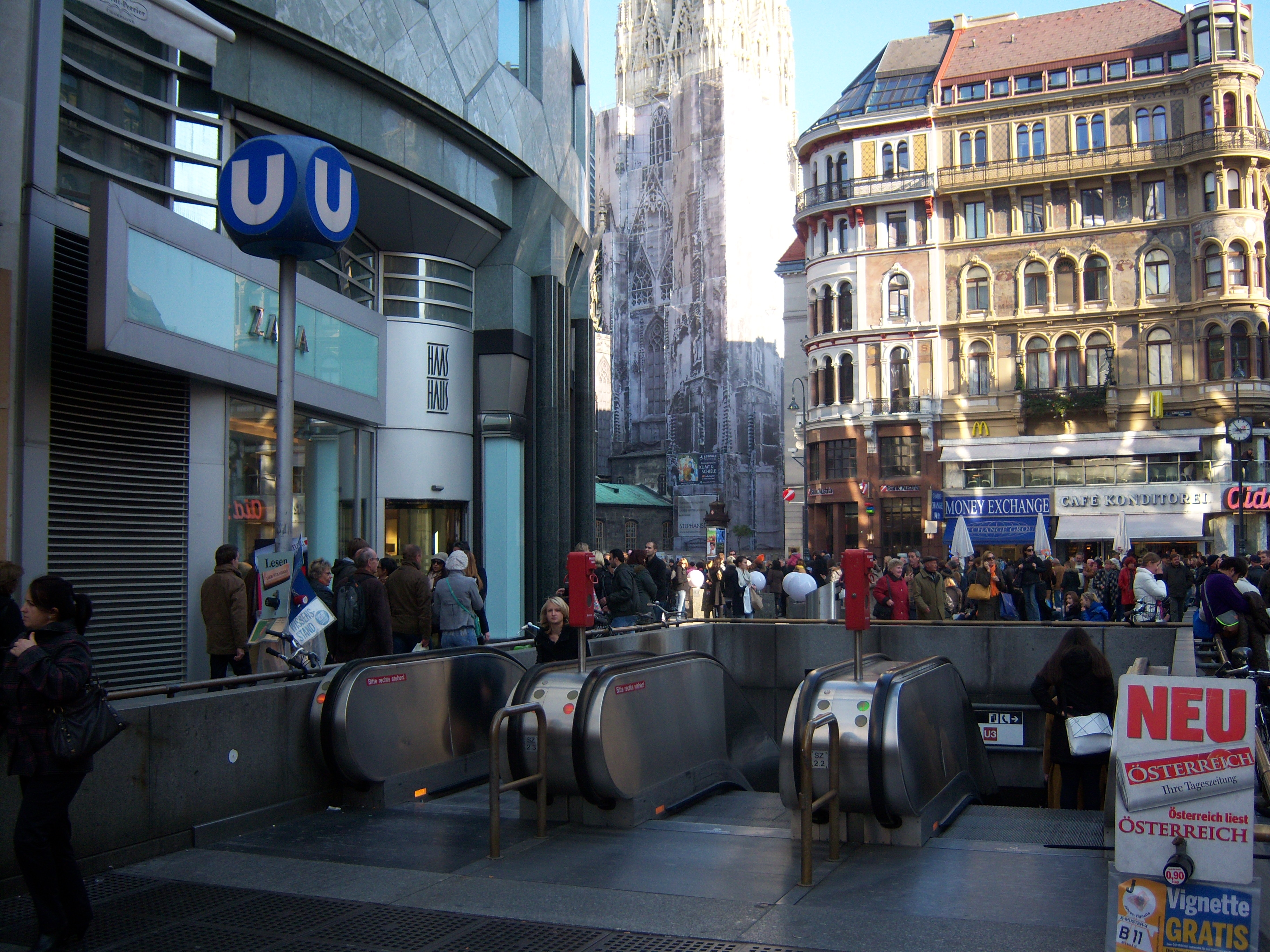 Zugang zur U-Bahn-Station Stephansplatz